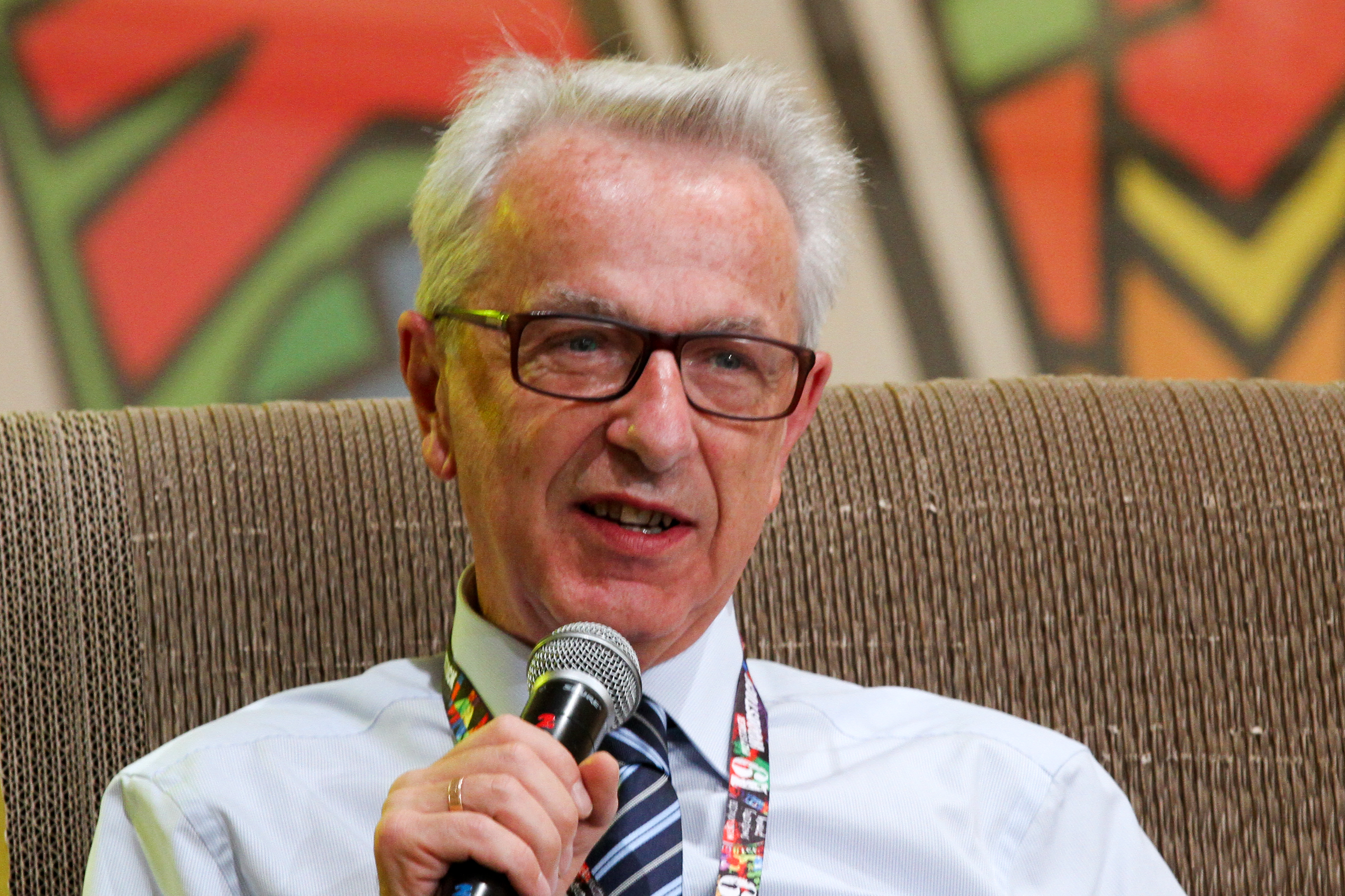 Przystanek Woodstock w 2013 r.